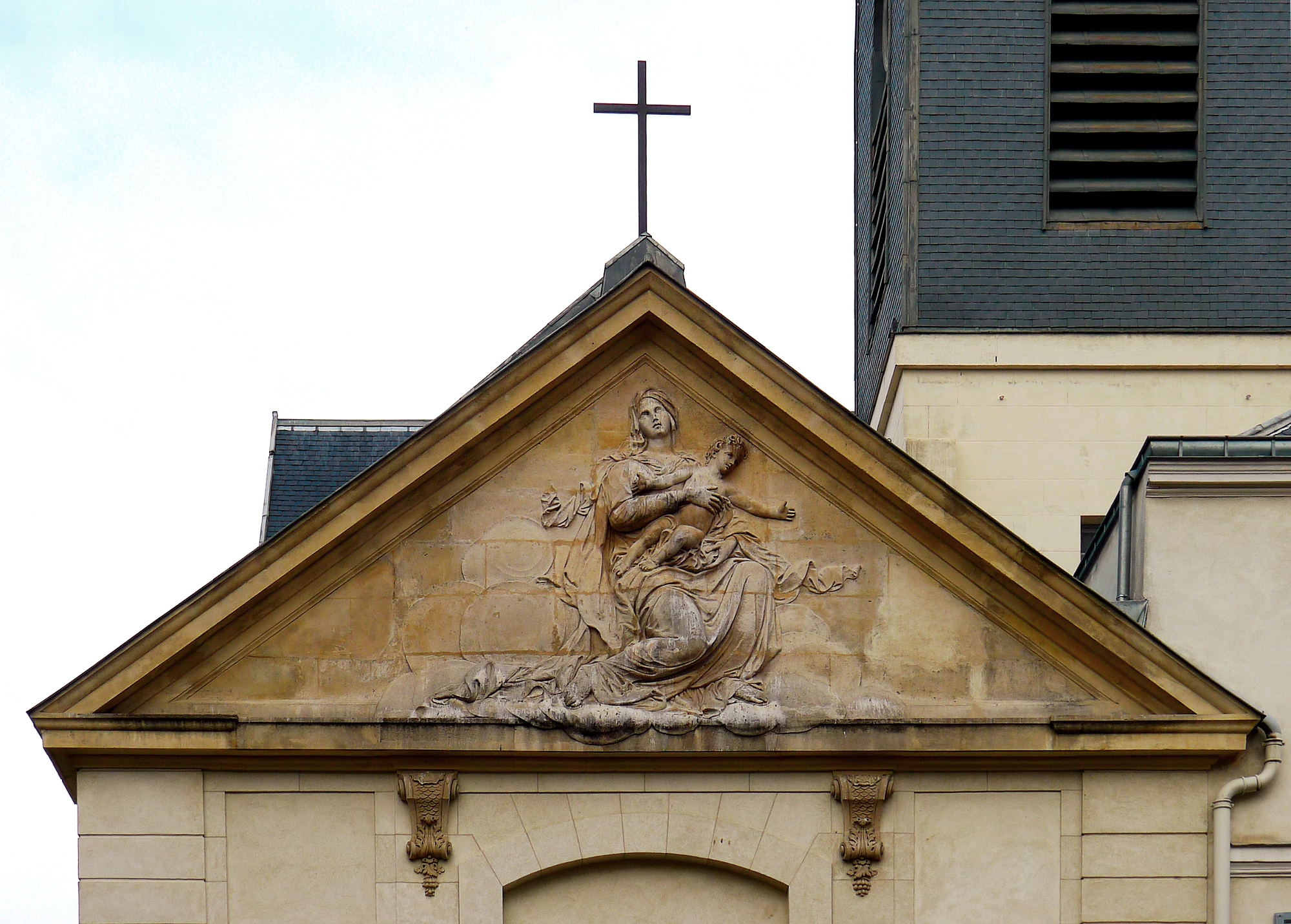 Église Sainte-Marguerite (sculpture du fronton) - Paris XI